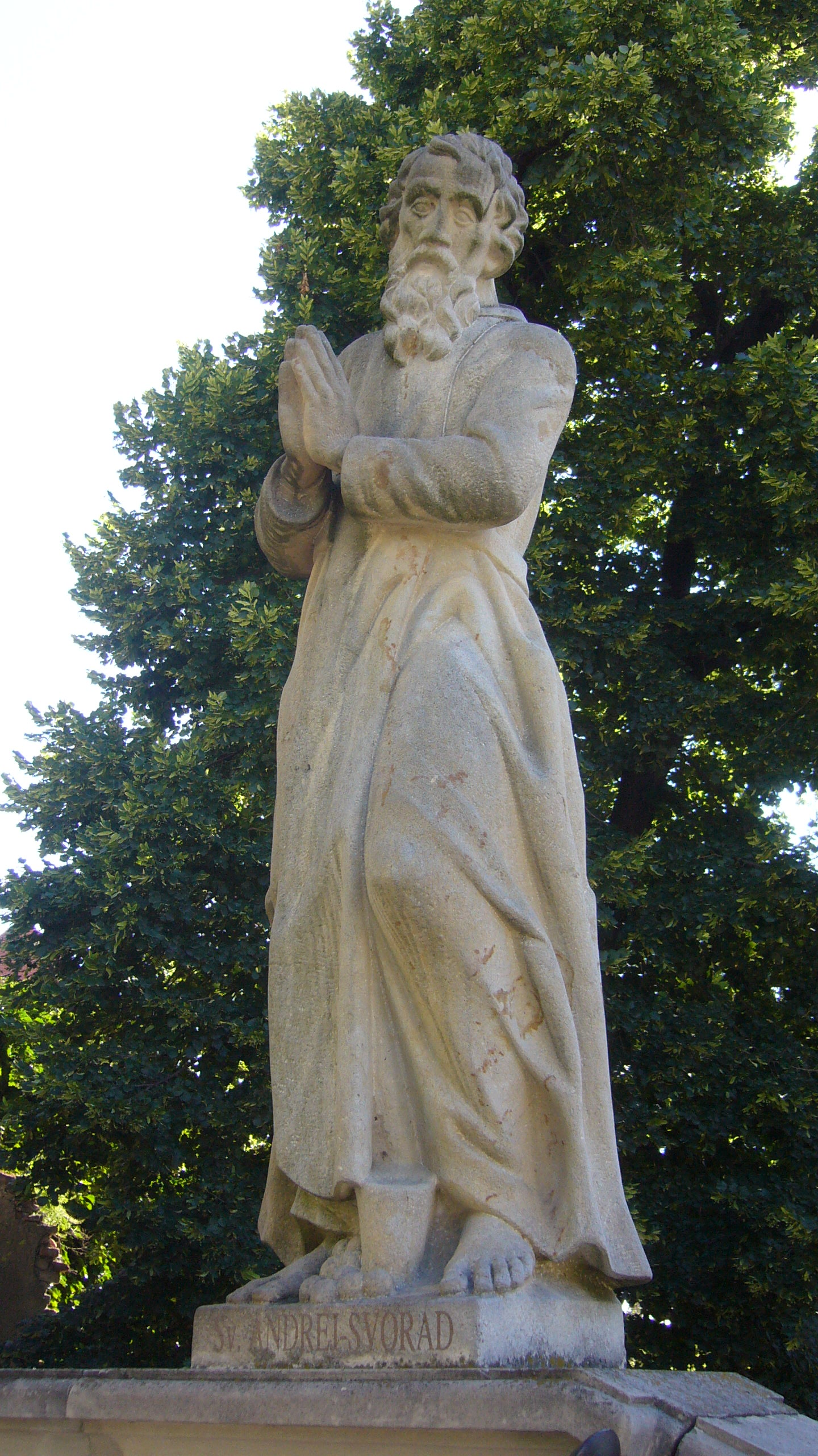 Svatý Ondřej Svorad, biskupství Nitra (SK)